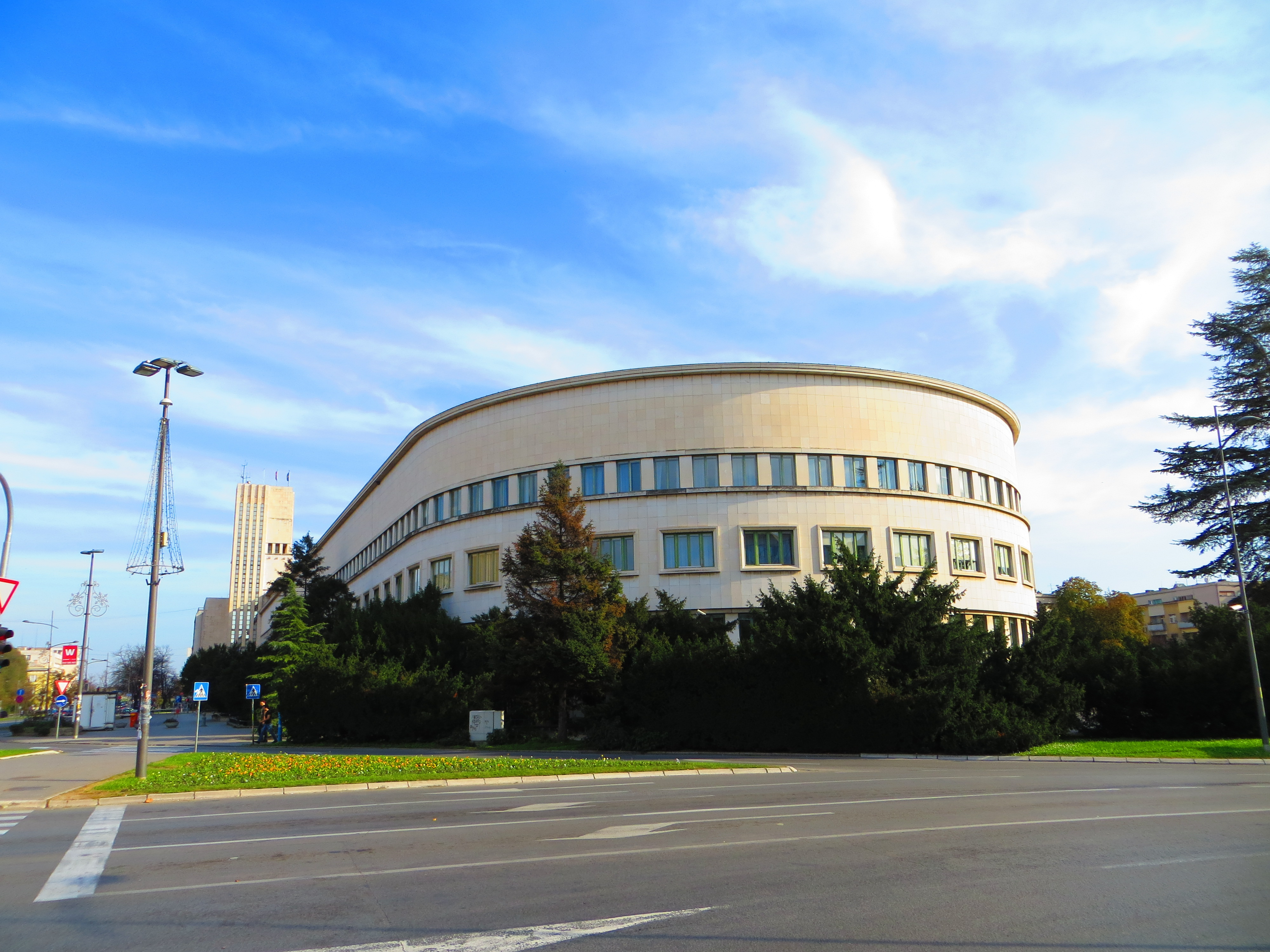 Zgrada Vlade Vojvodine